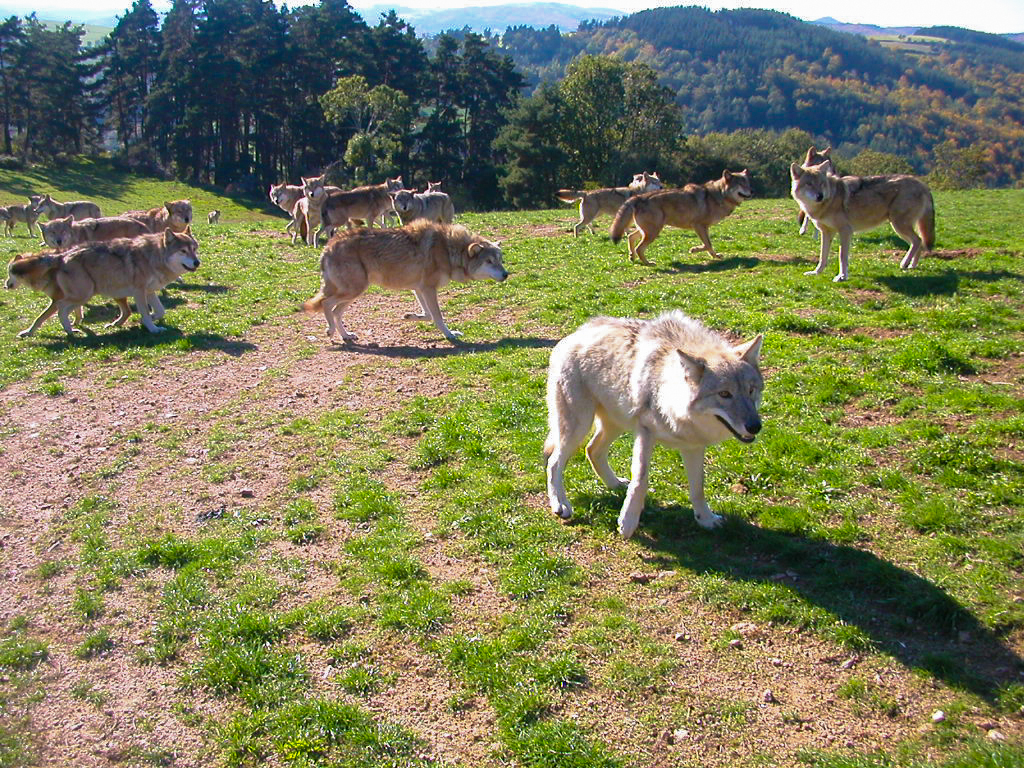 Loups de Mongolie recueillis par la Fondation Brigitte Bardot visibles dans le parc d'observation de 20 hectares dans le village de Sainte-Lucie